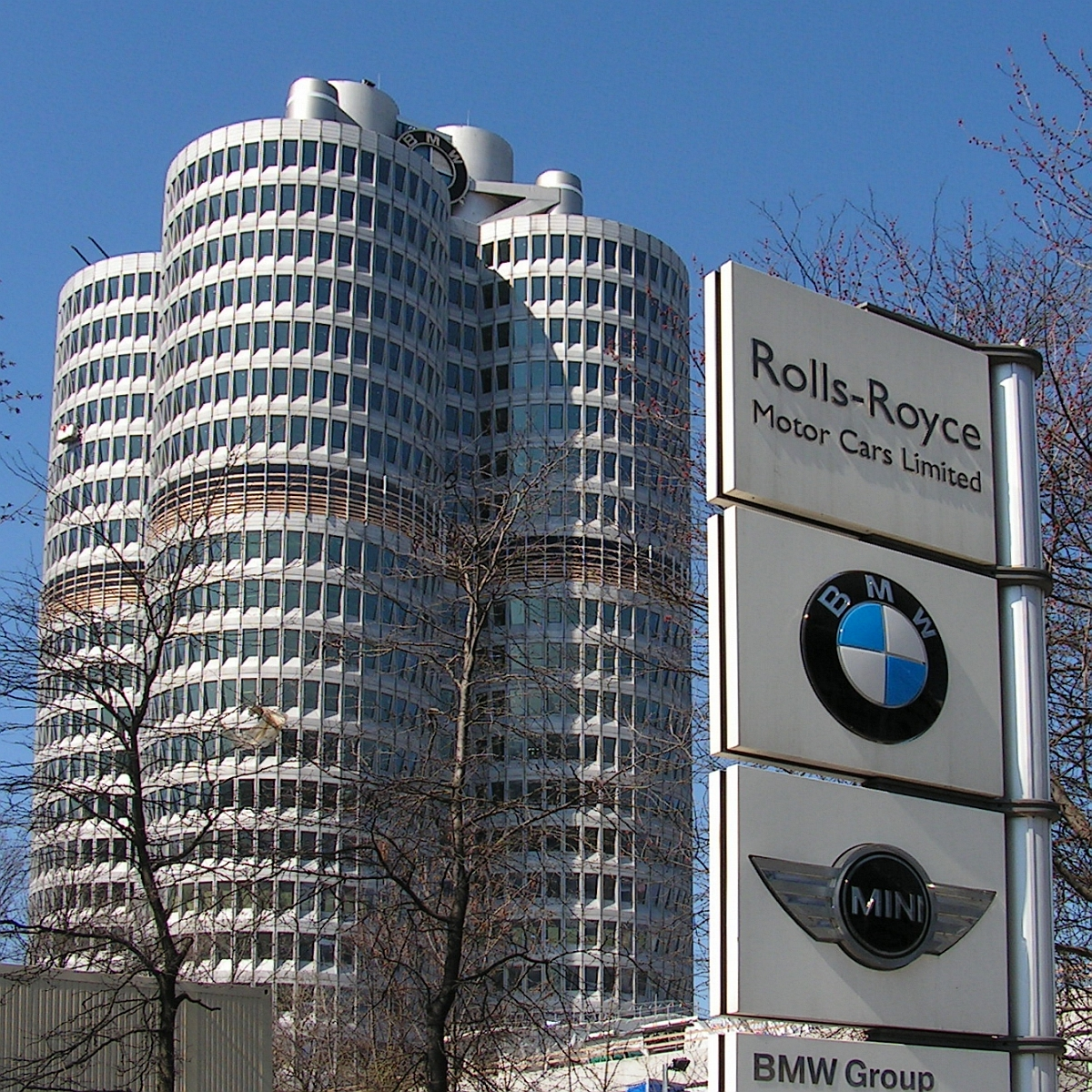 BMW München 2005 - BMW Group mit Mini und seit 2003 auch mit Rolls-Royce Motor Cars Markenrechten - Foto 2005 Wolfgang Pehlemann Wiesbaden Pict0083